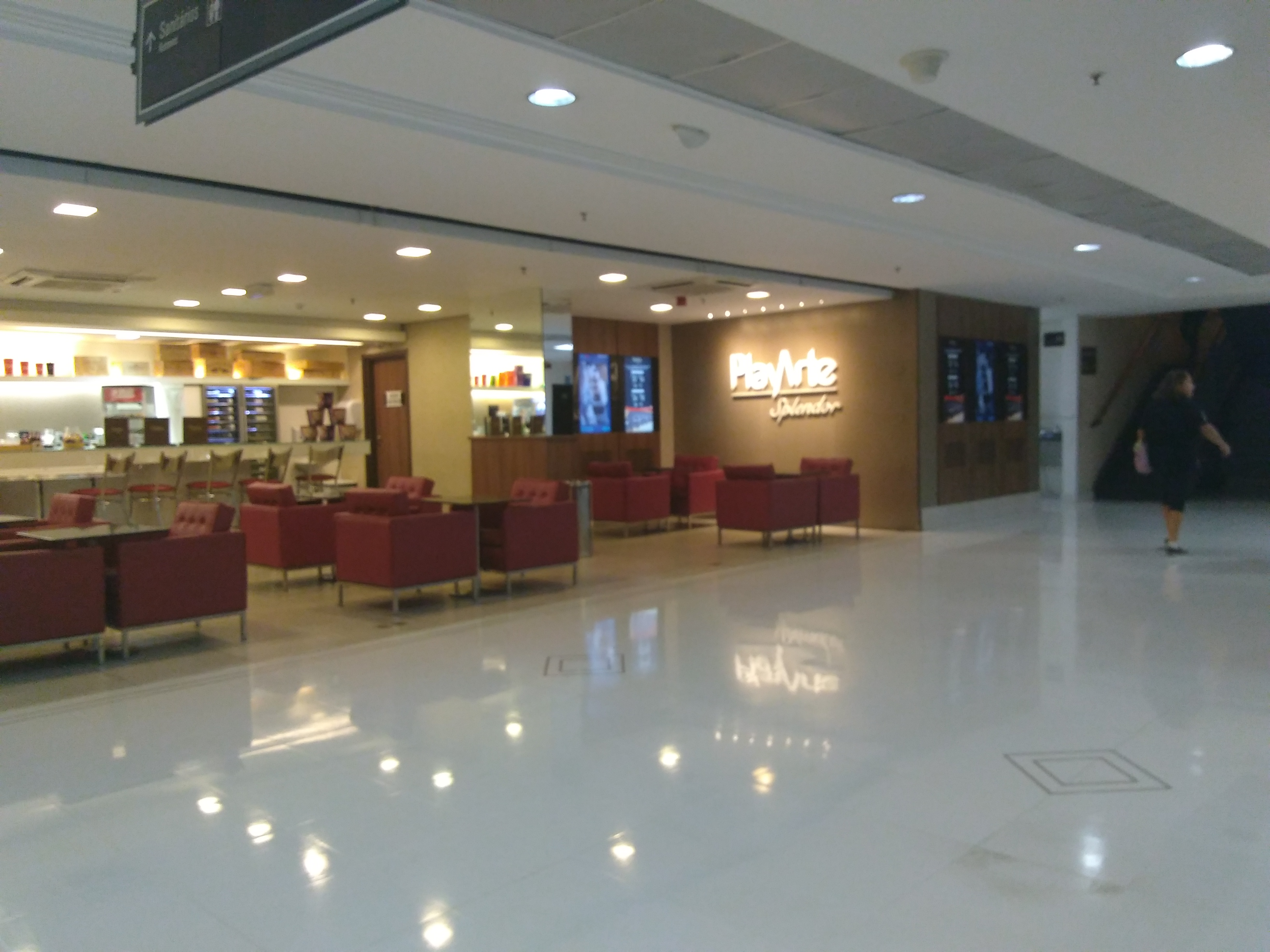 Vista do foyer do PlayArte Splendor, instalado no Shopping Pátio Paulista